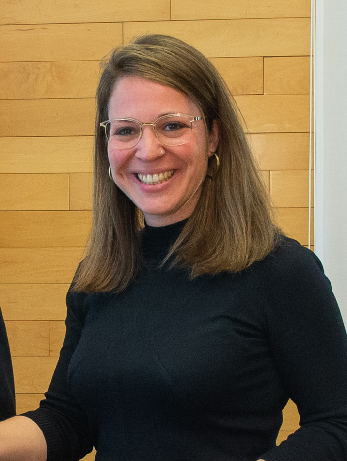 La Cambra de Barcelona i l’Ajuntament han signat el protocol de col·laboració per a la cessió d’espais i prestació de serveis comuns del nou edifici d’oficines i serveis que la Cambra de Barcelona construirà a la zona de Diagonal-Poblenou. El protocol l’han signat el president de la Cambra de Barcelona, Miquel Valls, i la quarta tinenta d’Alcaldia de l’Ajuntament de Barcelona, Janet Sanz.